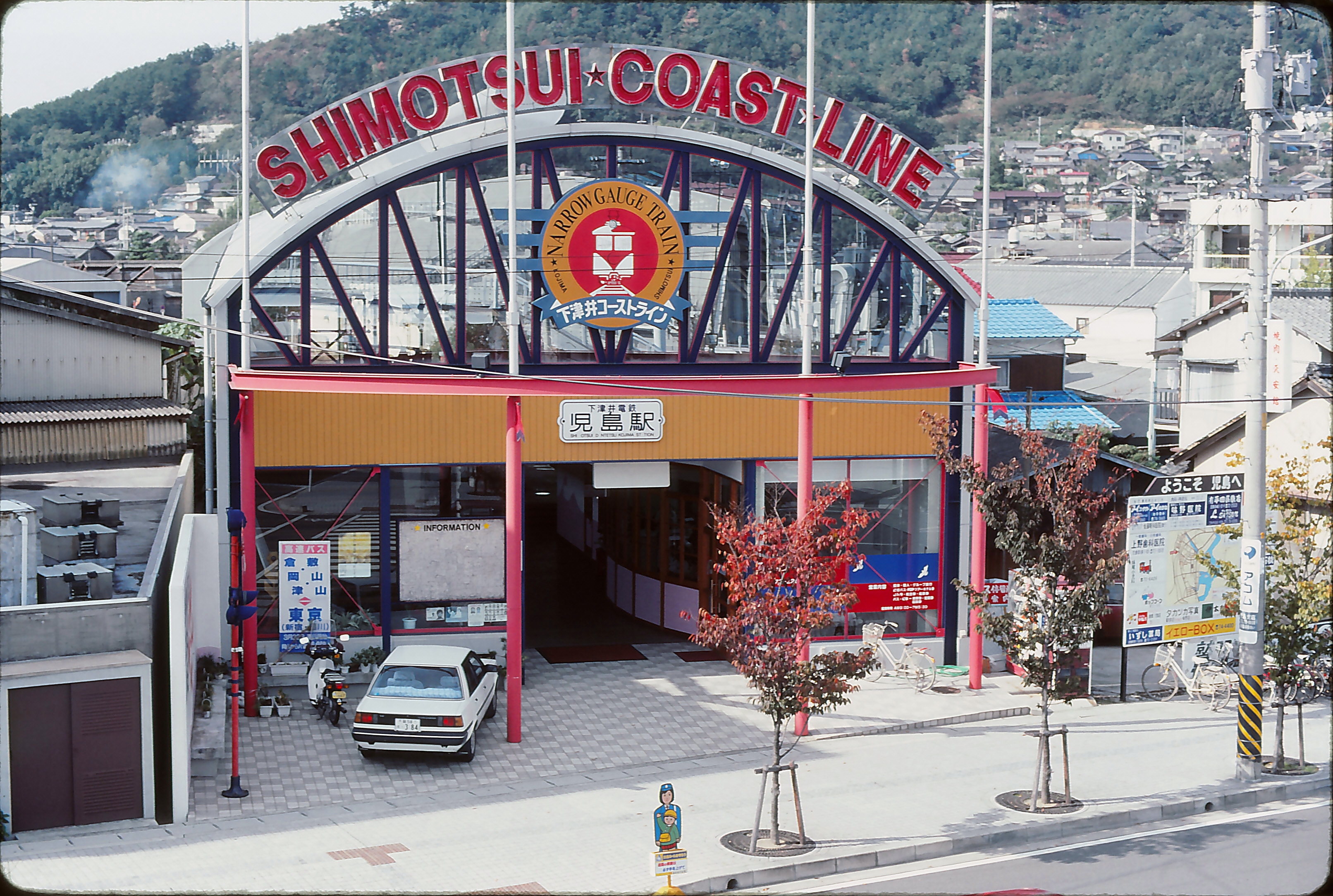 下津井電鉄児島駅 児島駅前の歩道橋（現在は撤去）から撮影。